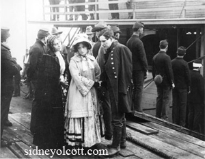 Jack J. Clark et Gene Gauntier dans A Daughter of Confederacy.